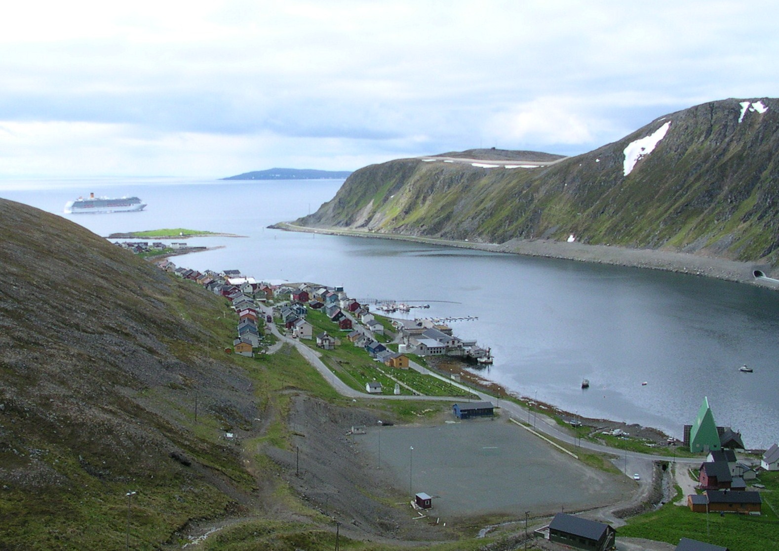 Nordvågen og Nordvågentunnelen